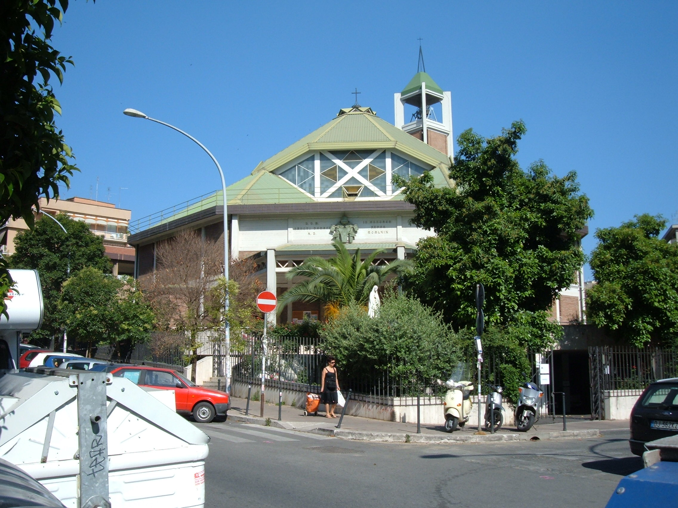 Chiesa di San Damaso I papa, a Roma, nel quartiere Gianicolense.